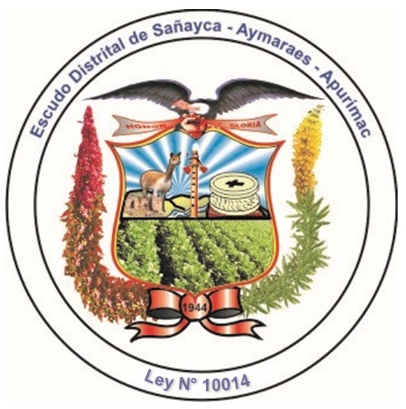 Presentamos el Escudo Oficial del Distrito de Sañayca. el cual es usado, durante sus ceremonias y eventos.